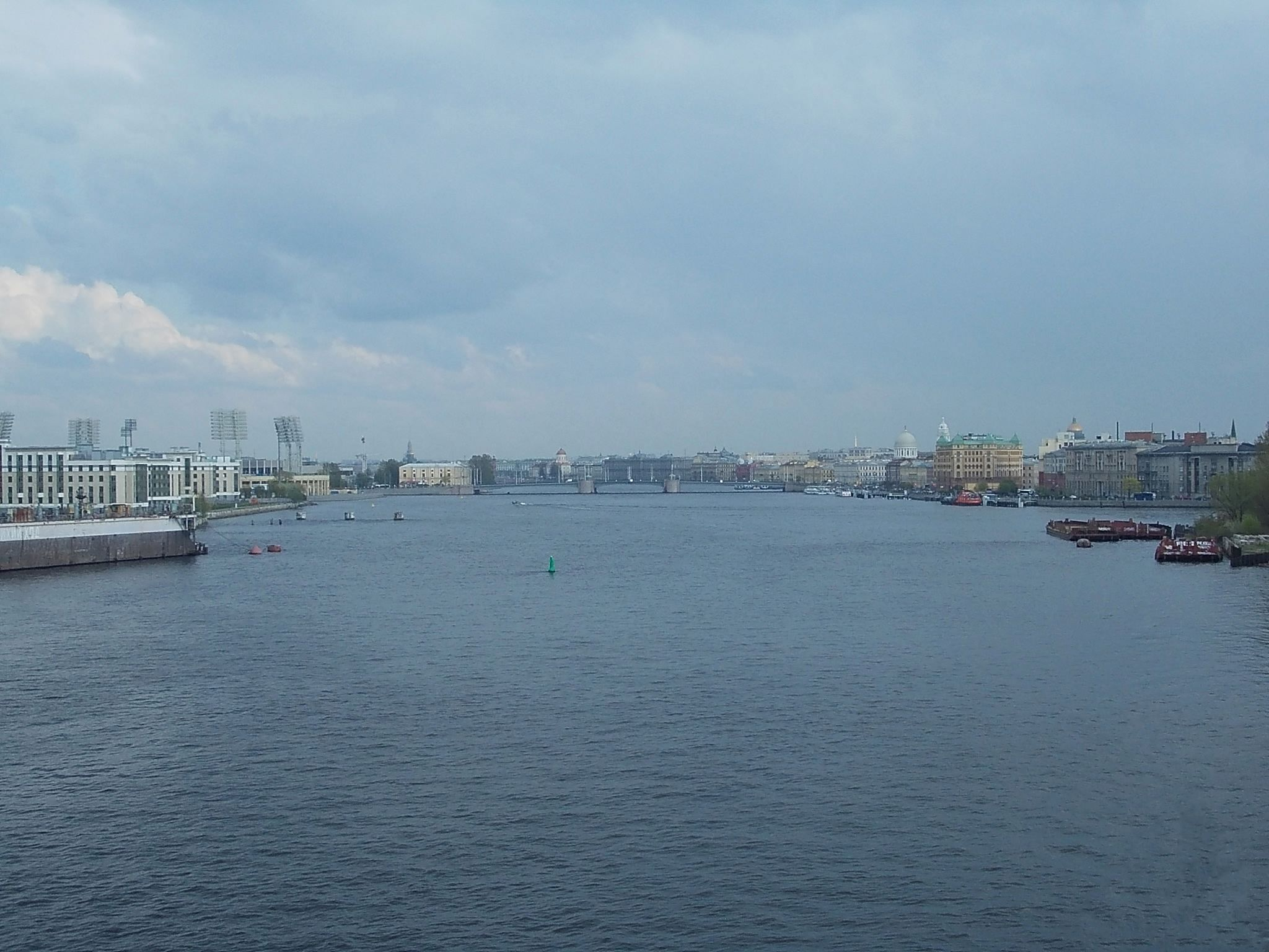 Вид с моста Бетанкура в сторону Тучкова моста